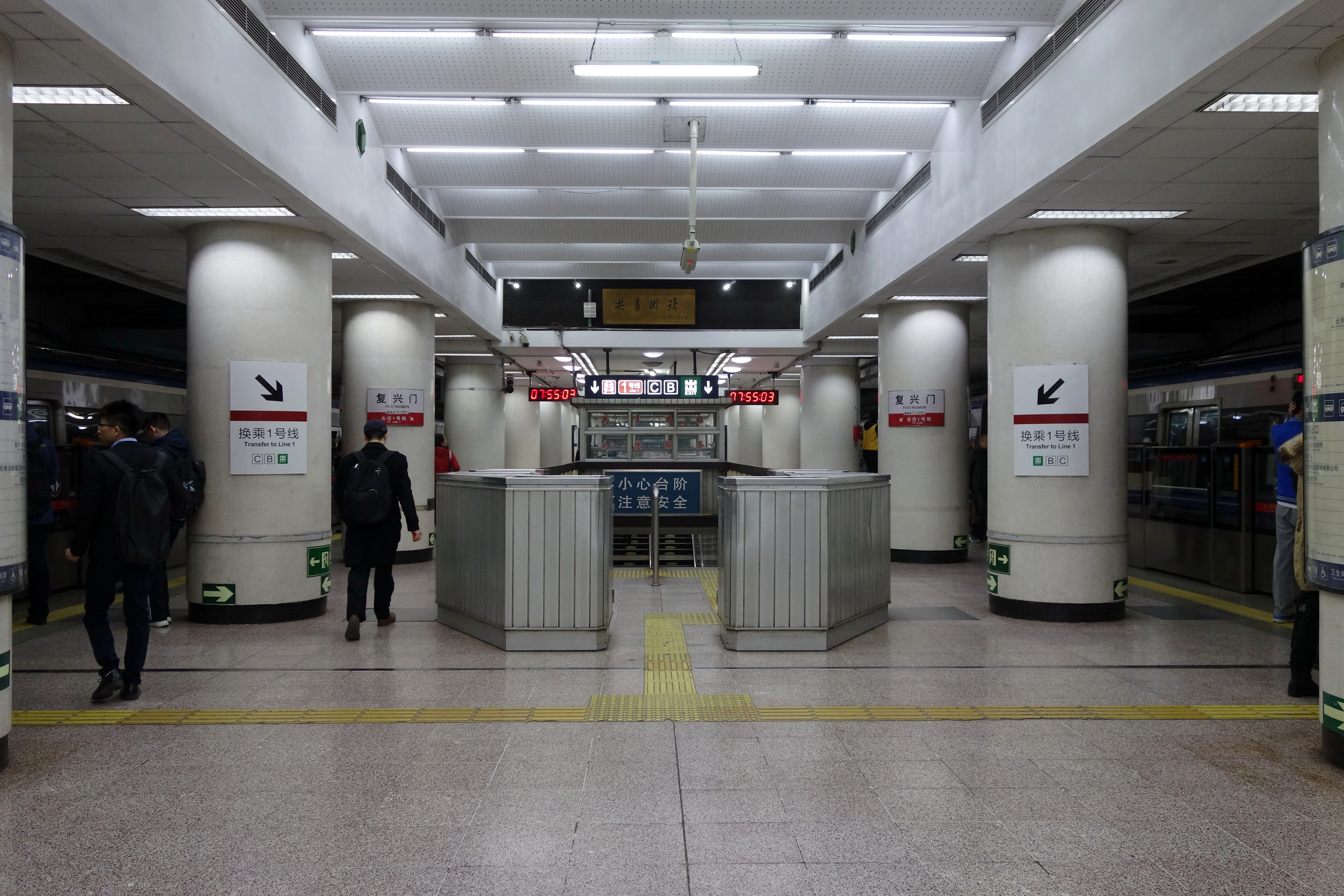 北京地铁2号线复兴门站岛式站台上与1号线站台的换乘通道。